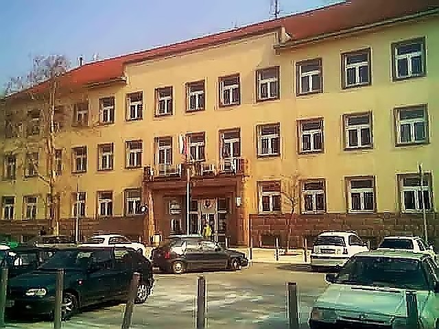 Šaľa, obvodný úrad